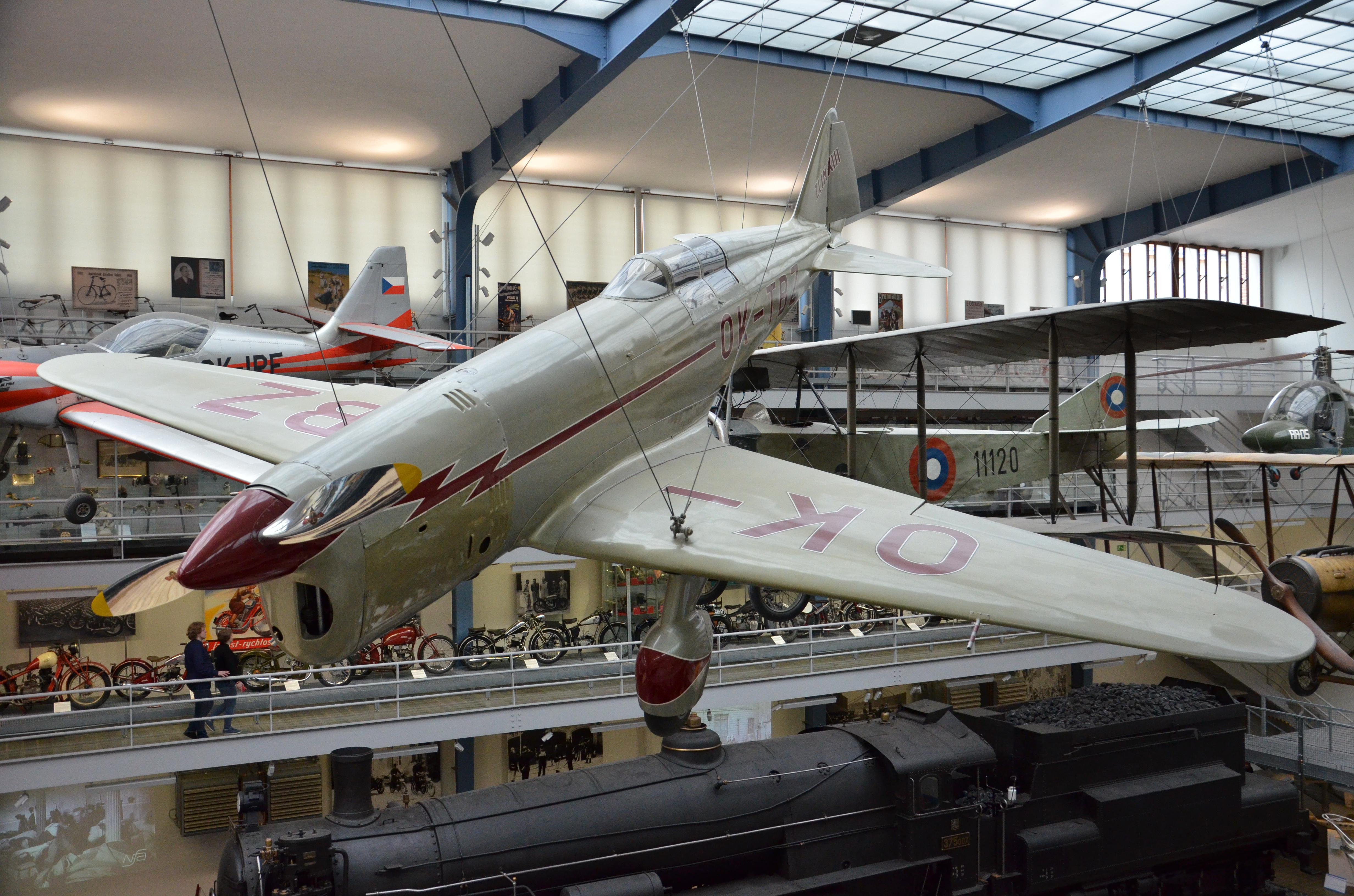 Zlín Z-XIII je československý celodřevěný dolnoplošník z roku 1937. Jeho vývoj byl předčasně ukončen a vyroben byl pouze jeden prototyp. Ten nyní vlastní Národní technické muzeum.